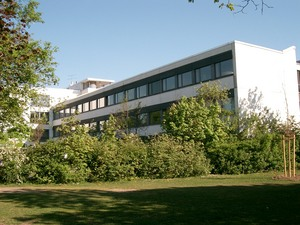 Städtisches Bertolt-Brecht-Gymnasium für Mädchen in München (Pasing)